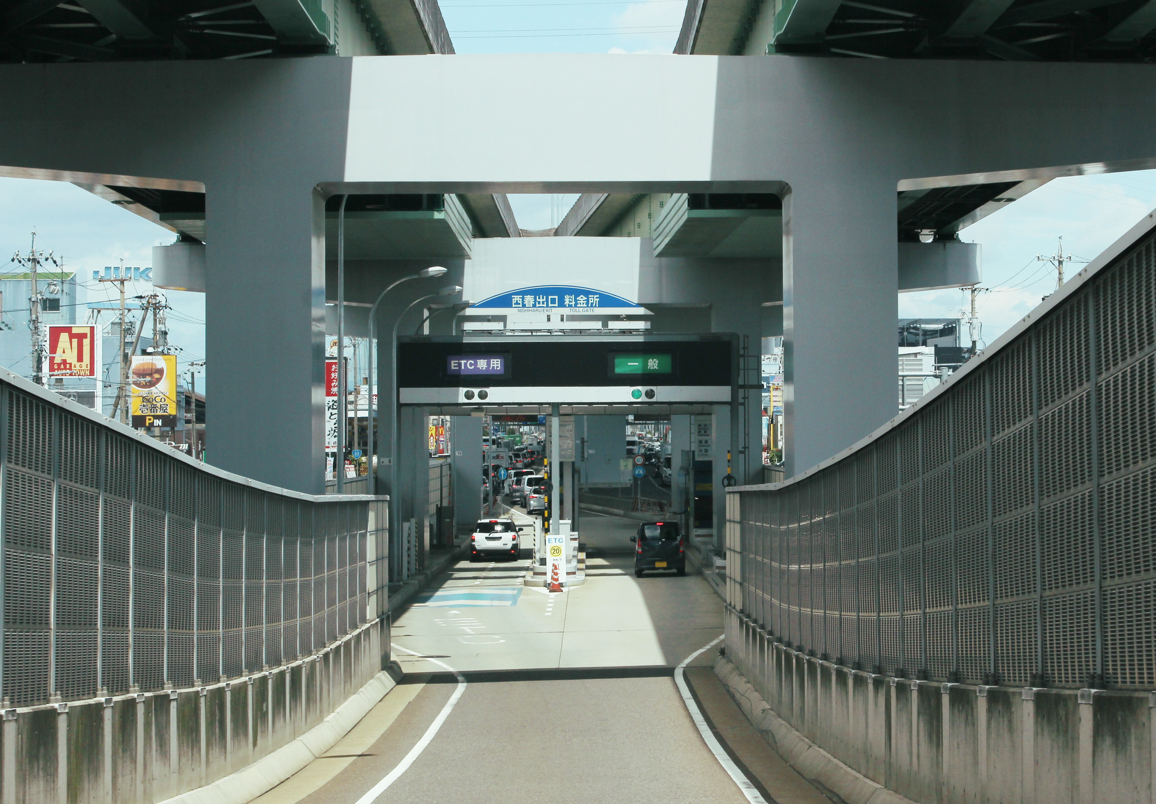 名古屋高速16号一宮線 西春出口